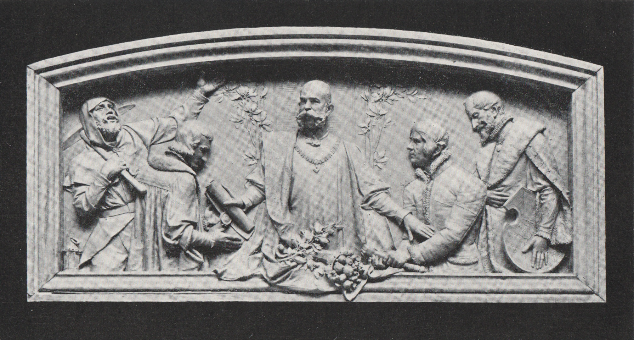 Antonín Popp: reliéf pro Okresní dům ve Slaném. Umístěn nad vstupními dveřmi.